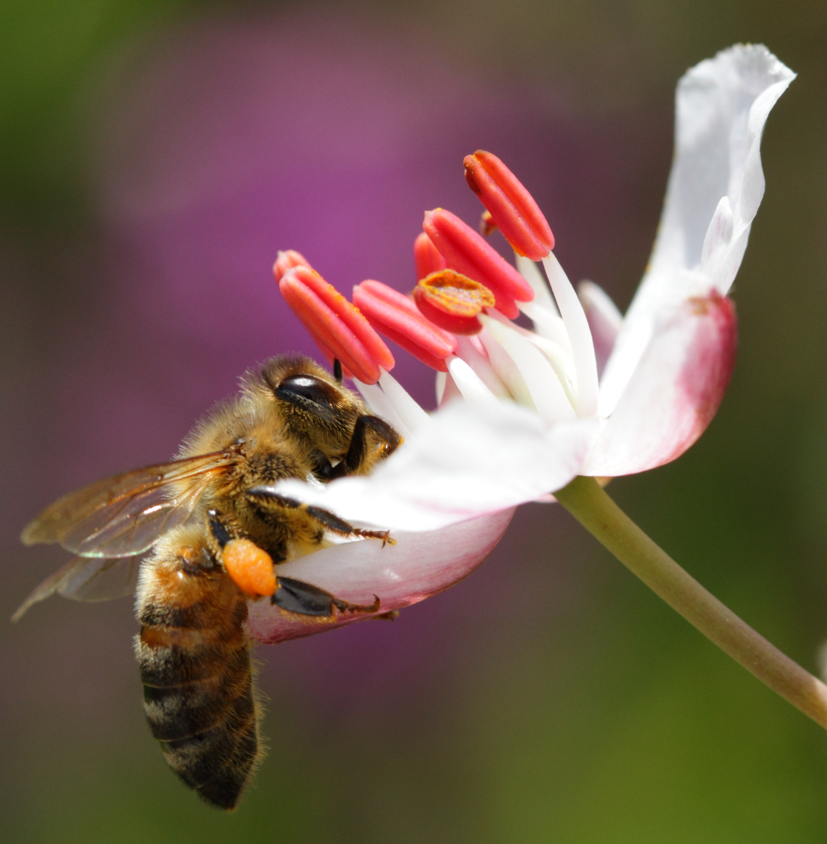 Eine Biene auf einer Schwanenblume Butomus umbellatus im Tiergarten Schönbrunn.